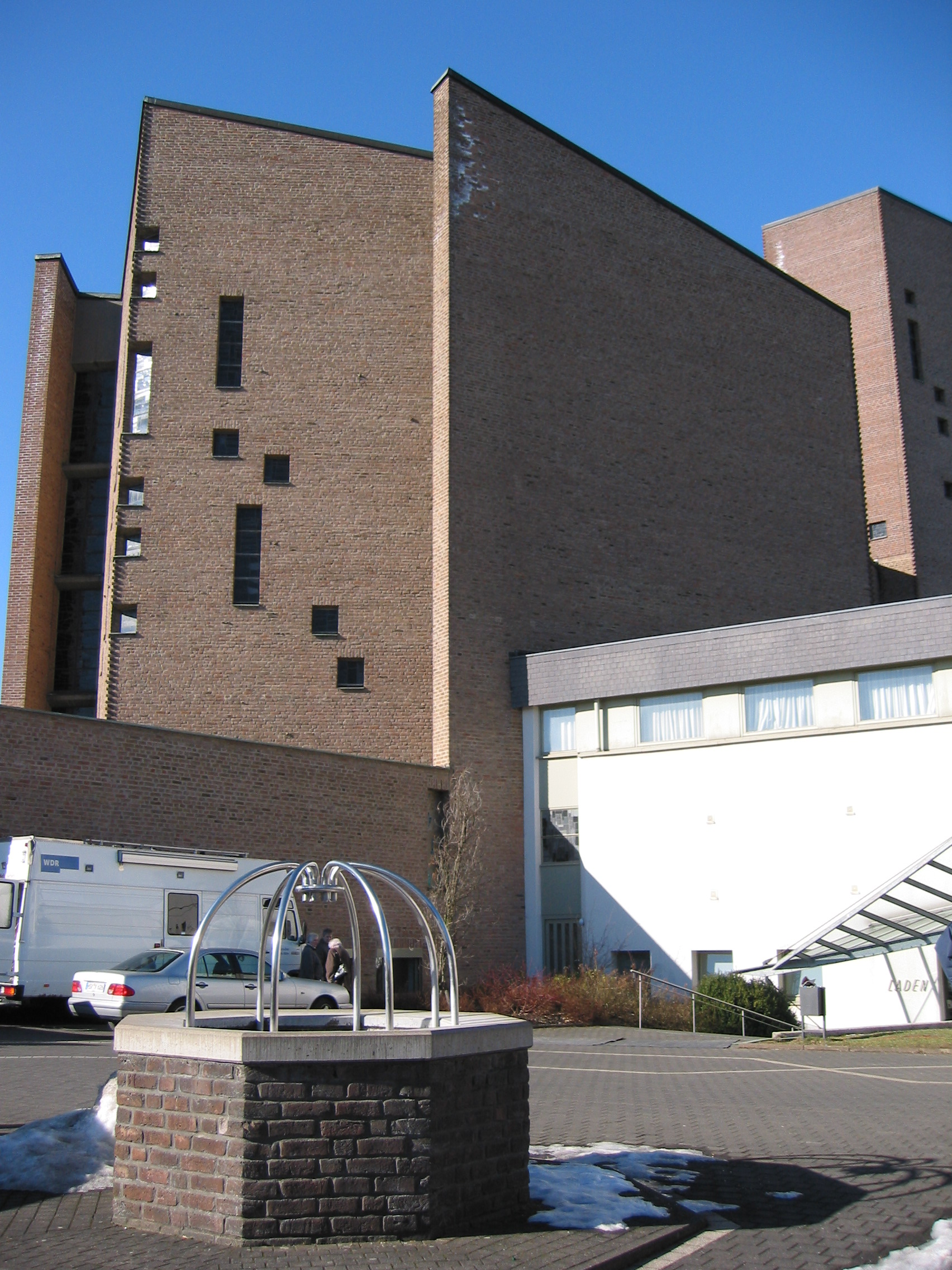 Monastery Meschede